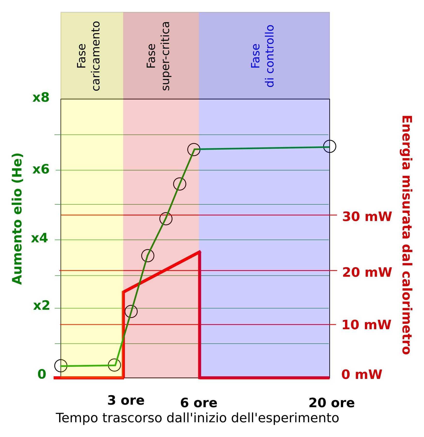 Fusione Fredda, diagramma derivato dal diagramma di aumento elio 4 rispetto energia prodotta, riportato dalla pubblicaizone: ANTONELLA DE NINNO, ANTONIO FRATTOLILLO. ANTONIETTA RIZZO, Experimental evidence of 4He production in a cold fusion experiment. ENEA doc. RT2002/41/FUS, pp16, Roma, 2002.